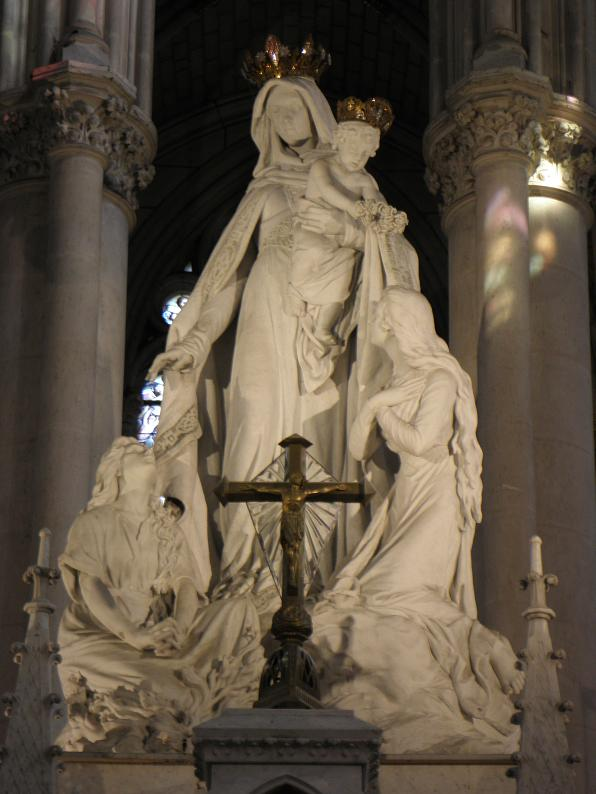 Statue de Notre-Dame de Montligeon en la basilique de La Chapelle-Montligeon (61).